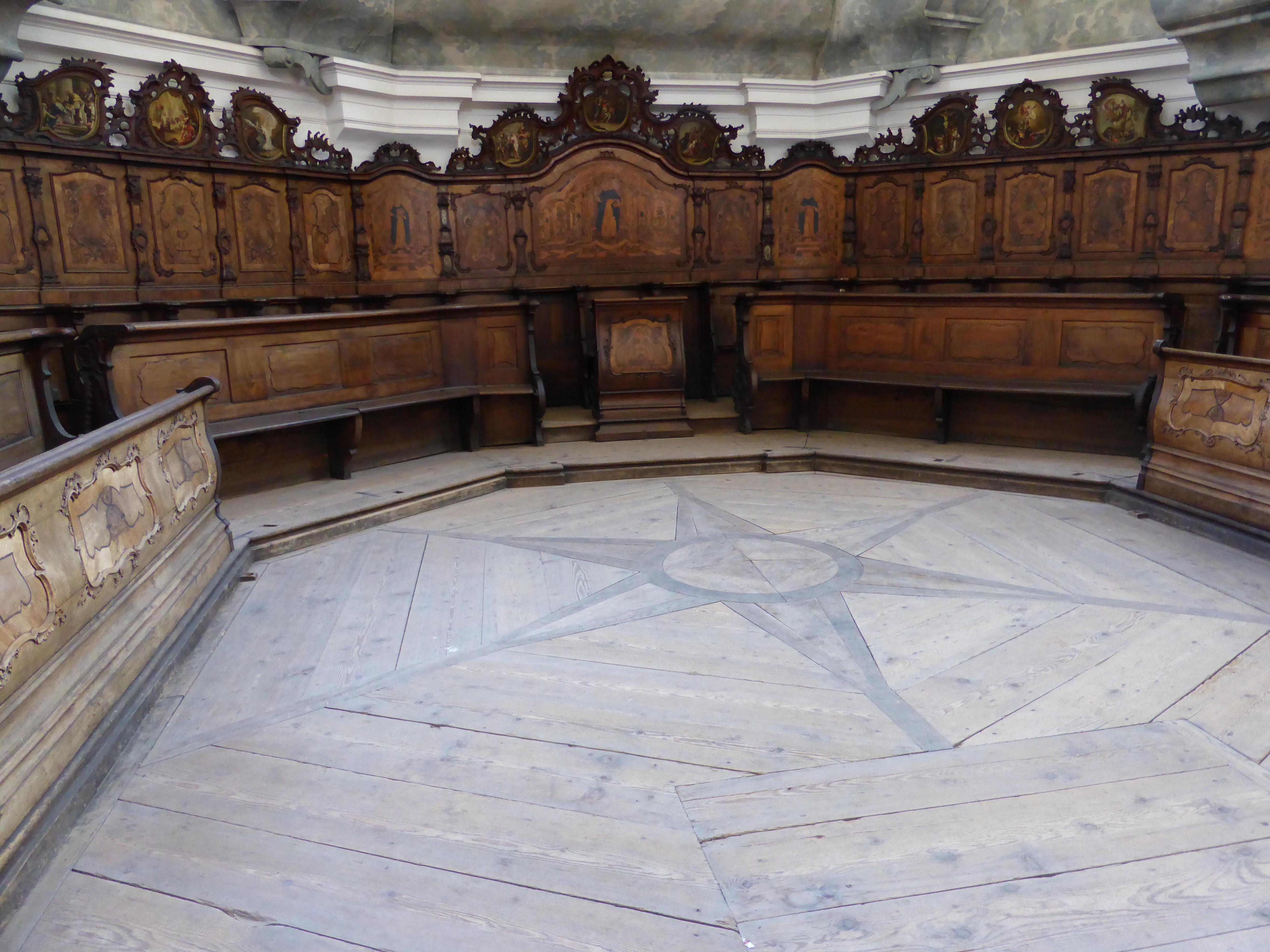 Chorgestühl mit Bodenabdruck der J. Schweinbacher Chororgel